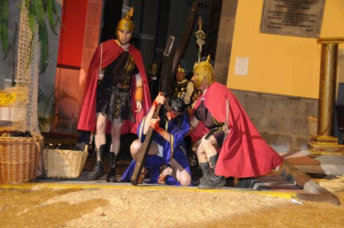 Desde hace varios años se viene celebrando la representación de la Pasión de Jesucristo, donde actores de todo el pueblo dan vida a los últimos momentos del Señor, acto al que cada año acude más gente.